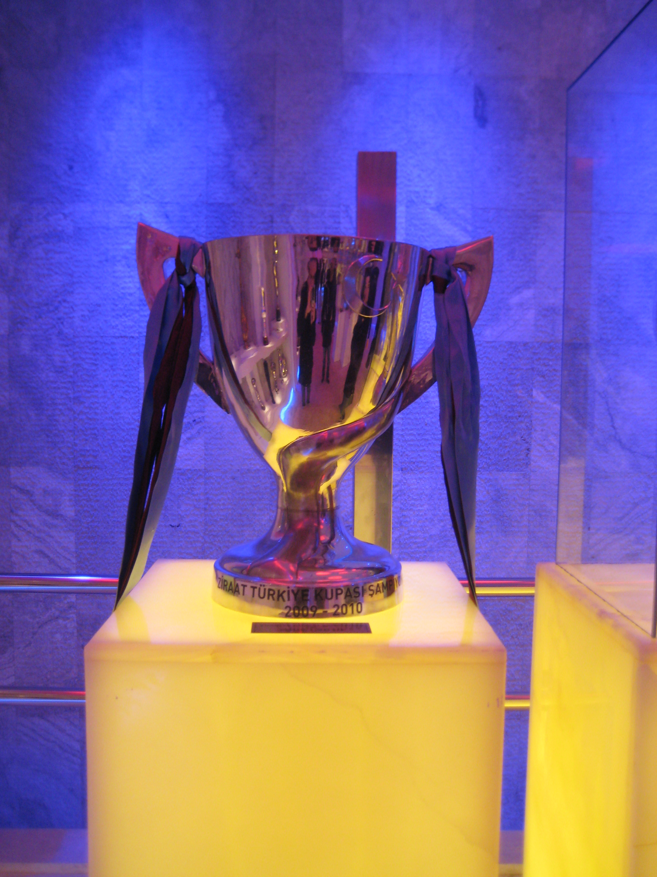 Trabzonspor Şamil Ekinci Müzesi'nde bulunan Türkiye Kupası.